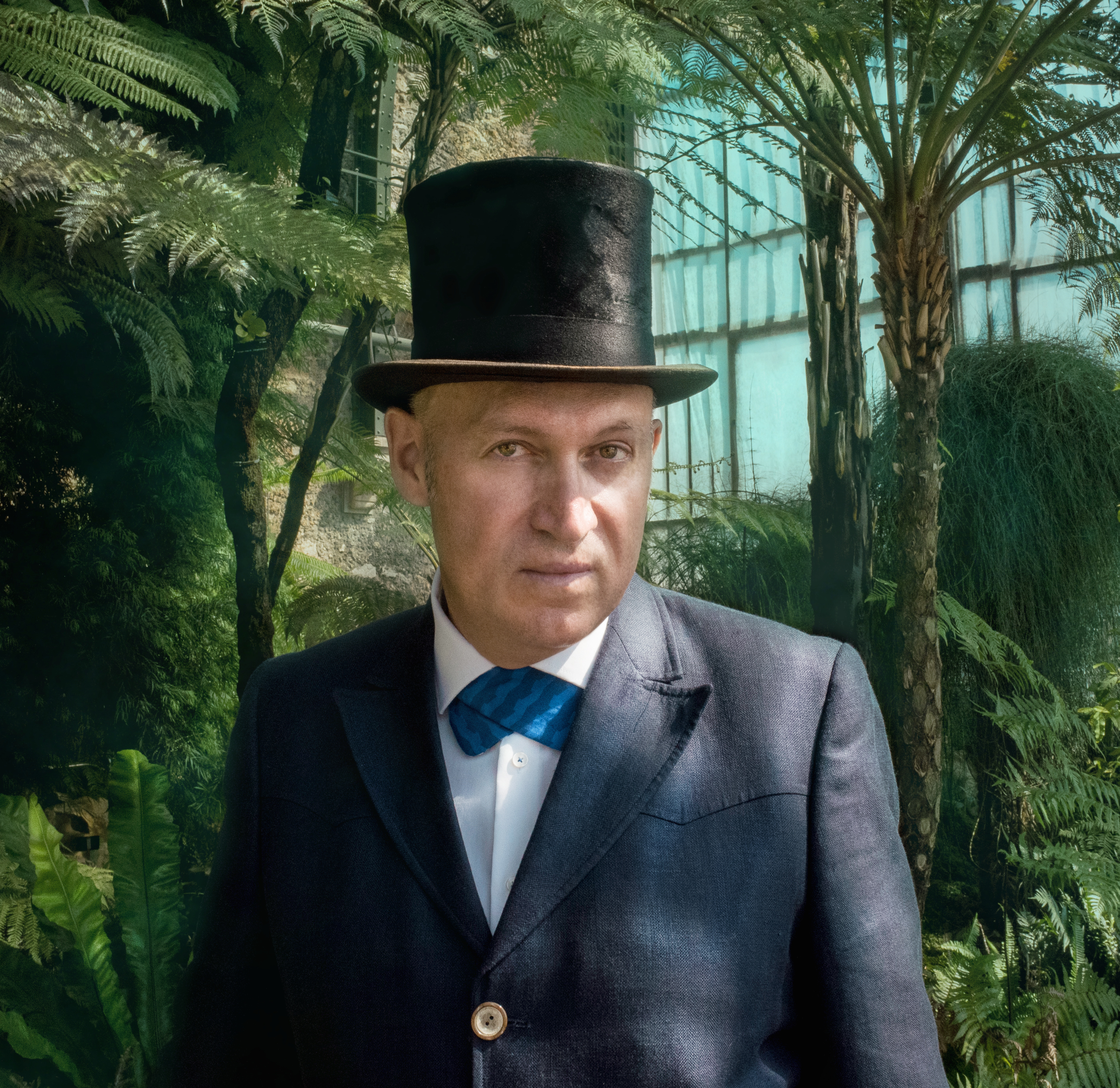 Philippe Cohen Solal by Joseph Colban